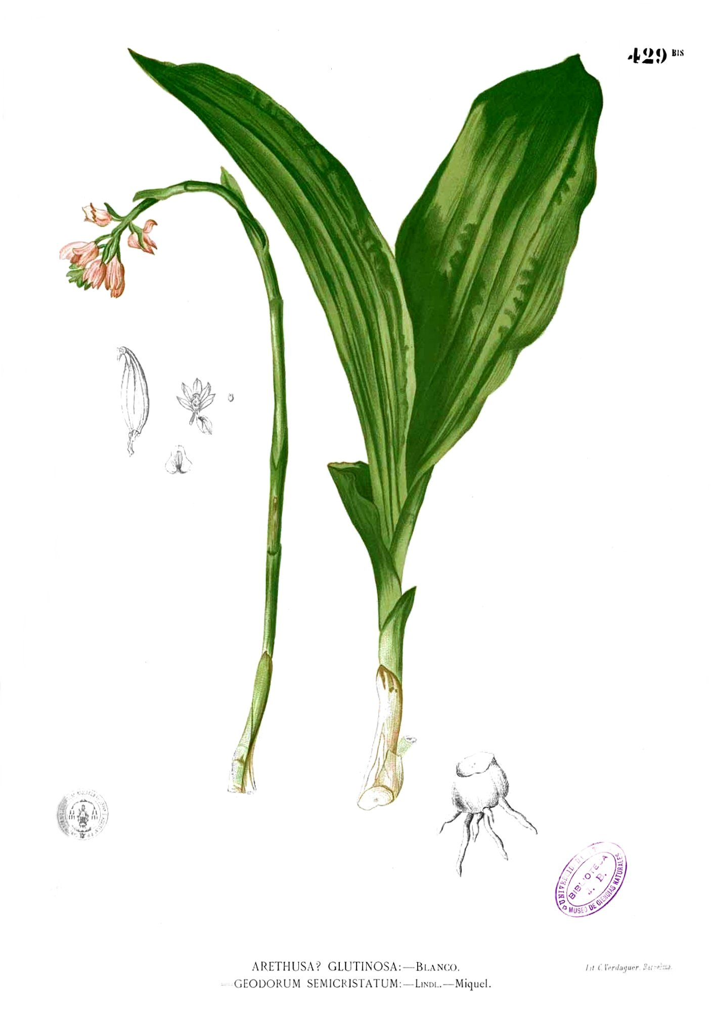 Geodorum densiflorum - Plate from book